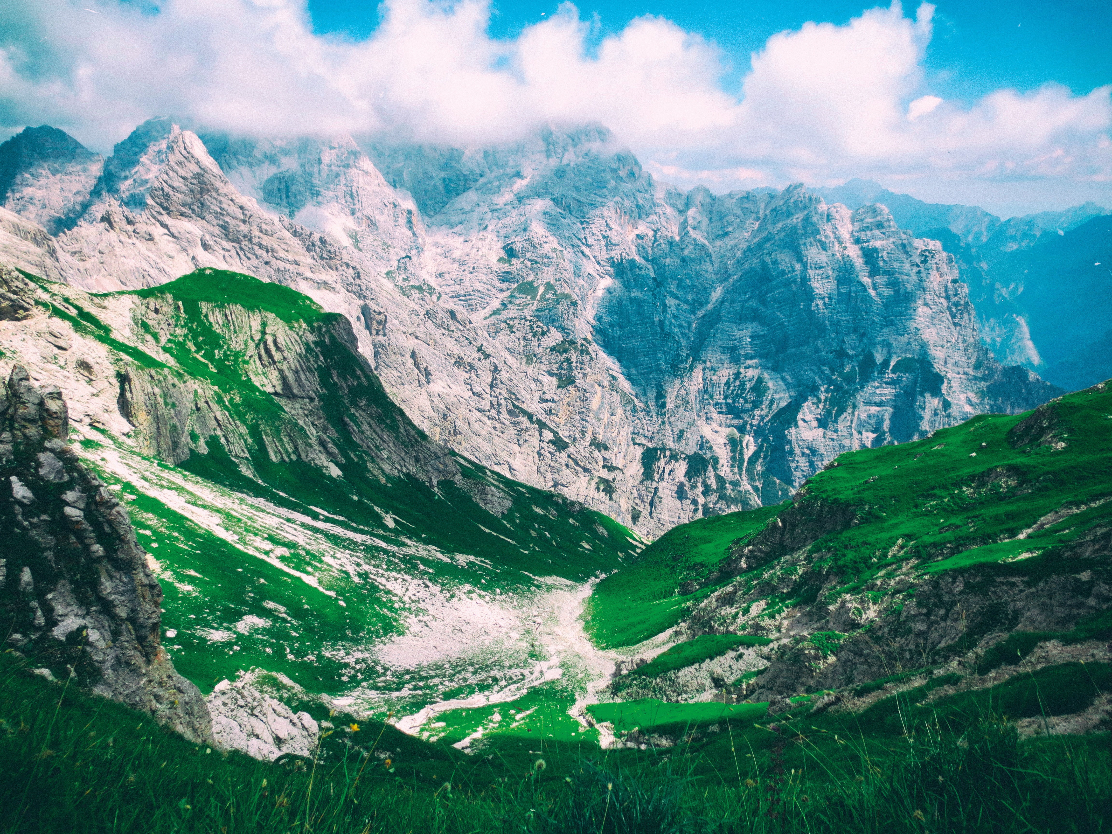 Cimolais